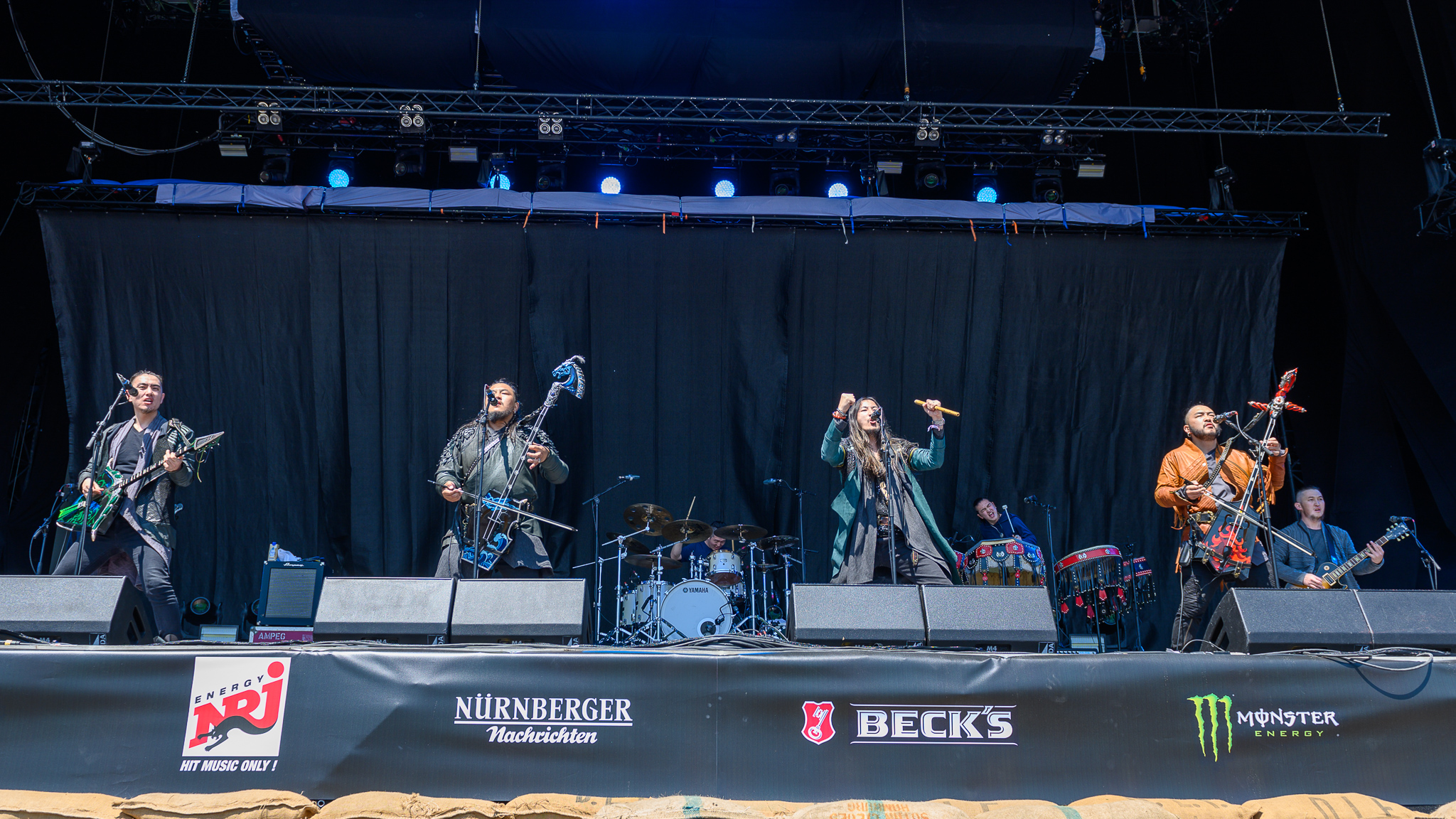 ARGO-Konzerte,Beck's Park Stage,Konzert,Livekonzert,Livemusik,Musik,RiP,Rock im Park 2019,The Hu